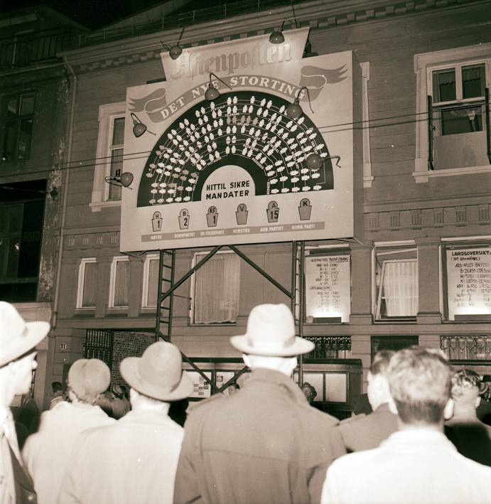 Beskrivelse: Publikum følger spent med på Aftenpostens valgbarometer. Fotograf: Billedbladet NÅ/Fj. Arkivreferanse: Riksarkivet/PA_797_2015B_005